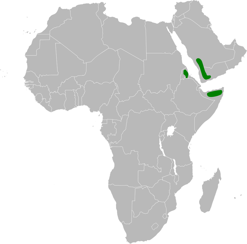 Calandrella blanfordi distribution map, based on